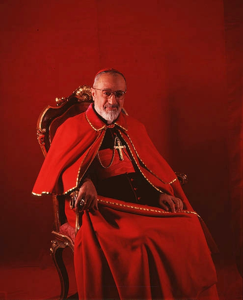 Krikor Bedros XV Aghagianian, 1895-1971, Cardinale della Chiesa cattolica armena, Prefetto della Sacra Congregazione De Propaganda Fide - Città del Vaticano e Padre conciliare (1965).